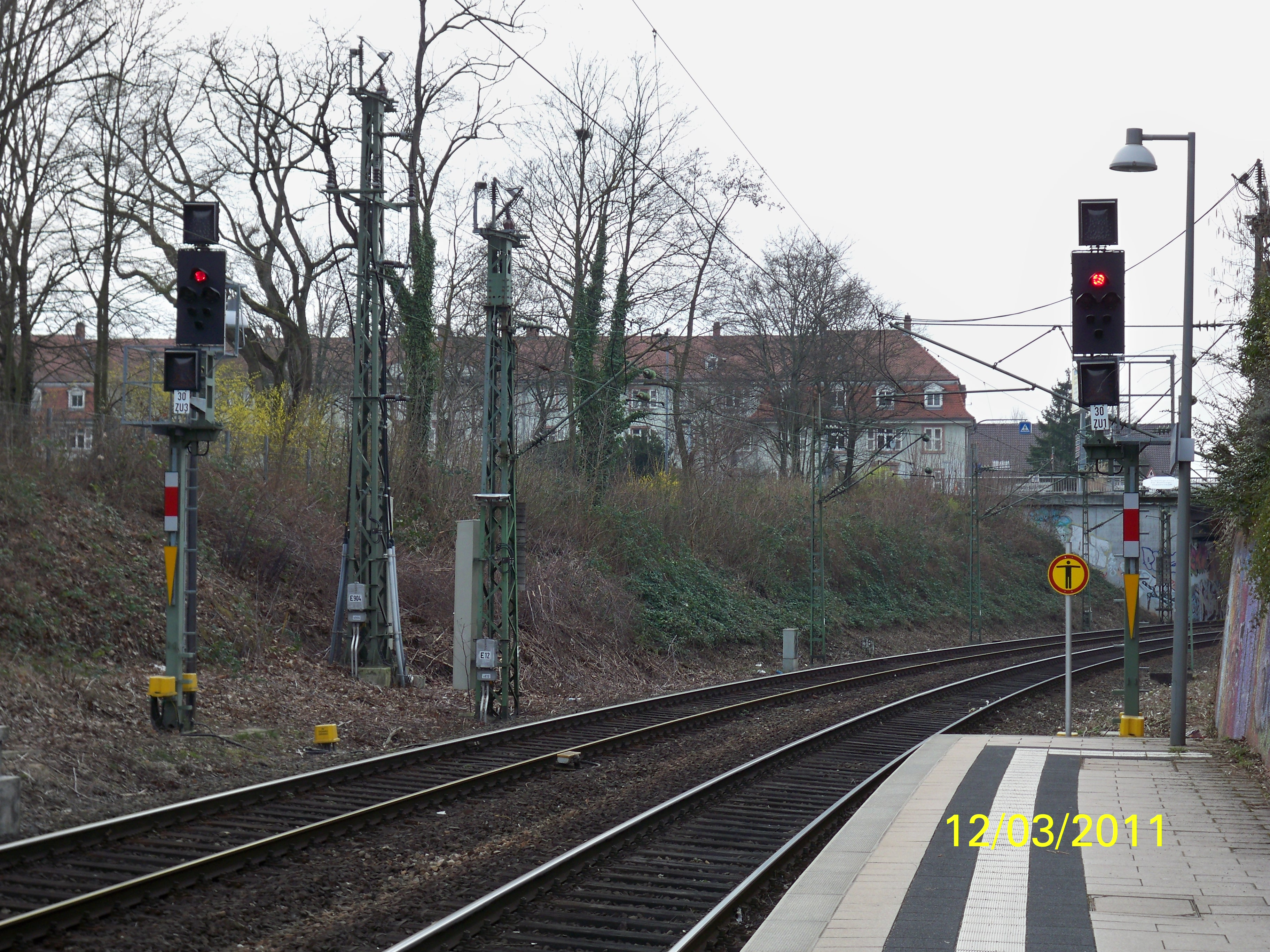 Zwischensignal in Heidelberg Hauptbahnhof, Bahnhofsteil Heidelberg-Weststadt/Südstadt